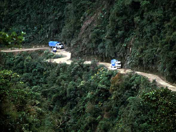 Yungas/Bolivien; Juli 2000